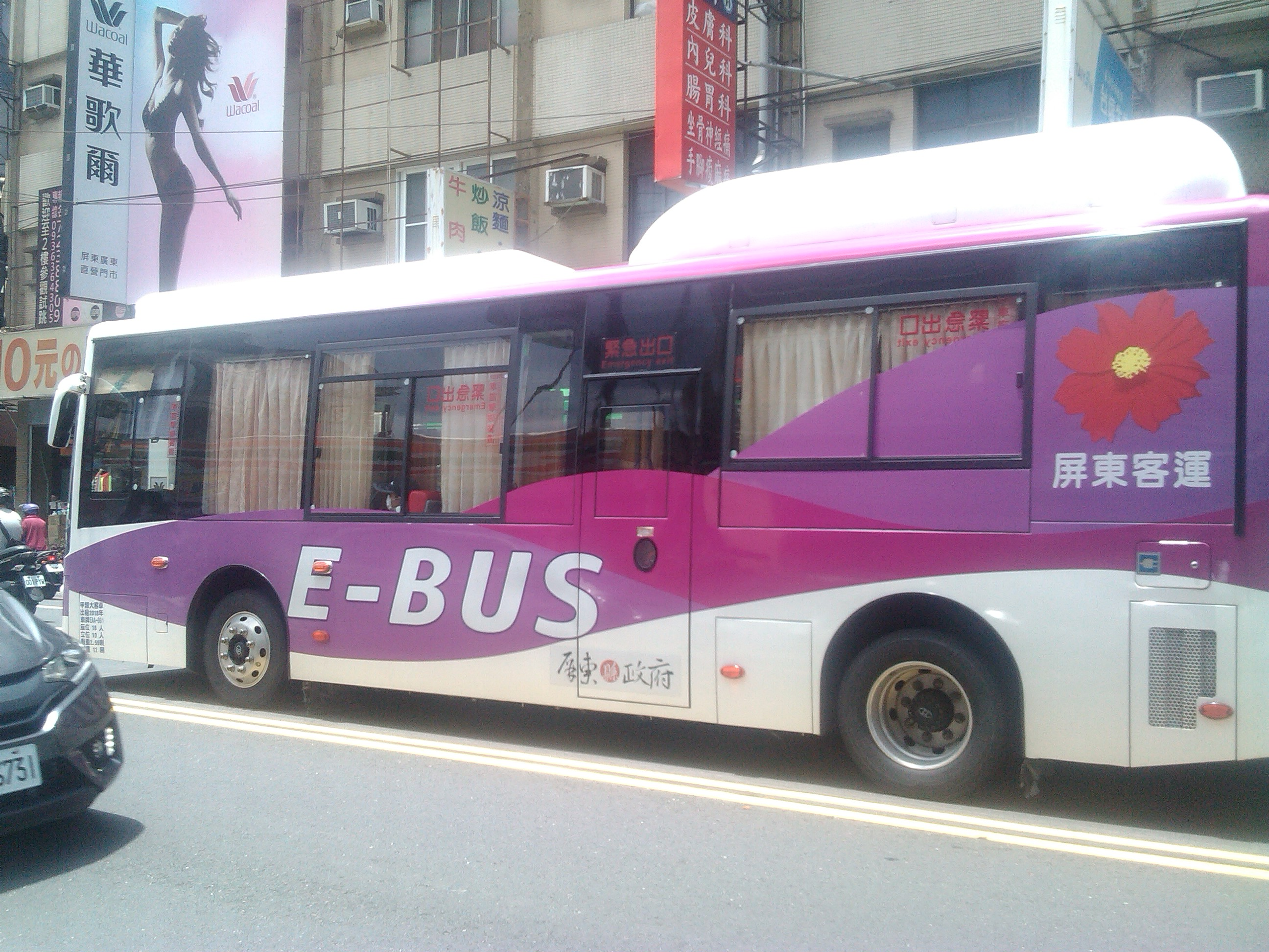 同上